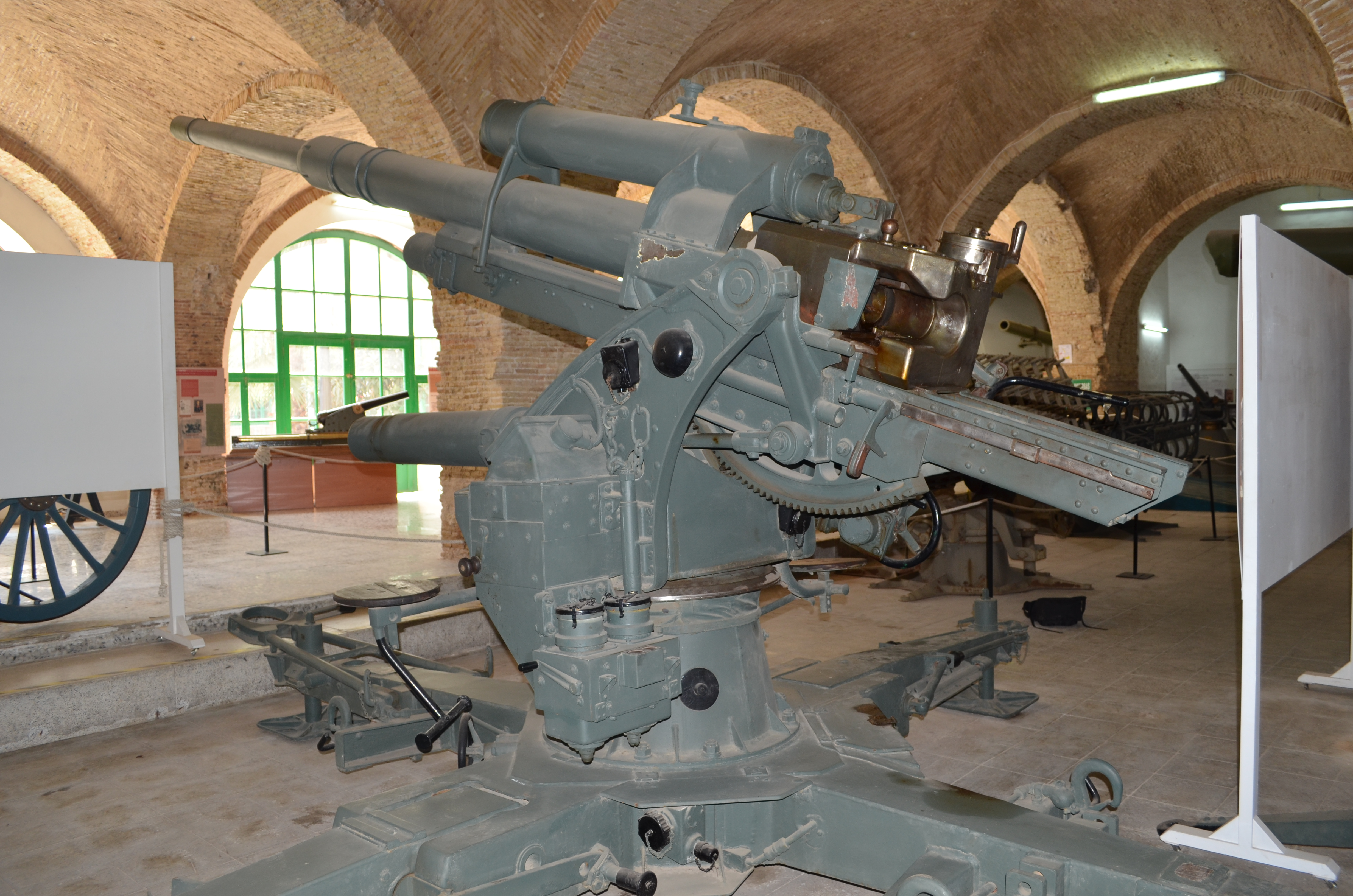 Cañón antiaéreo de 88 mm